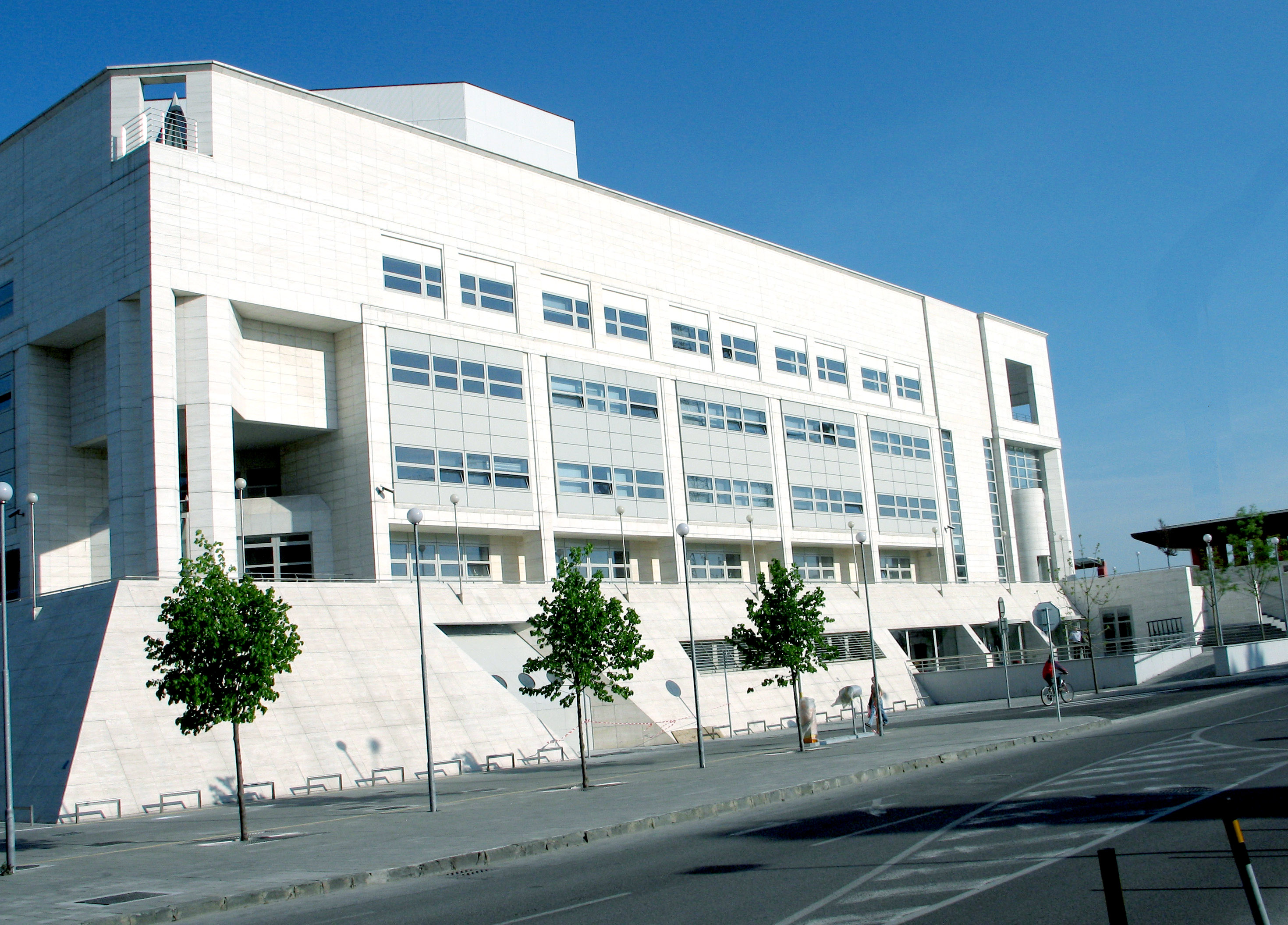 Nová budova Slovenského národného divadla v Bratislave